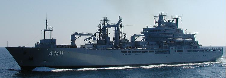 EGV Berlin, aufgenommen 2003 Eigene Aufnahme, GNU-FDL (Info war leider beim ersten Speichern verloren gegangen) 16:12, 13. Nov 2004 KuK 751 x 260 (28848 Byte) (EGV Berlin, aufgenommen 2003)